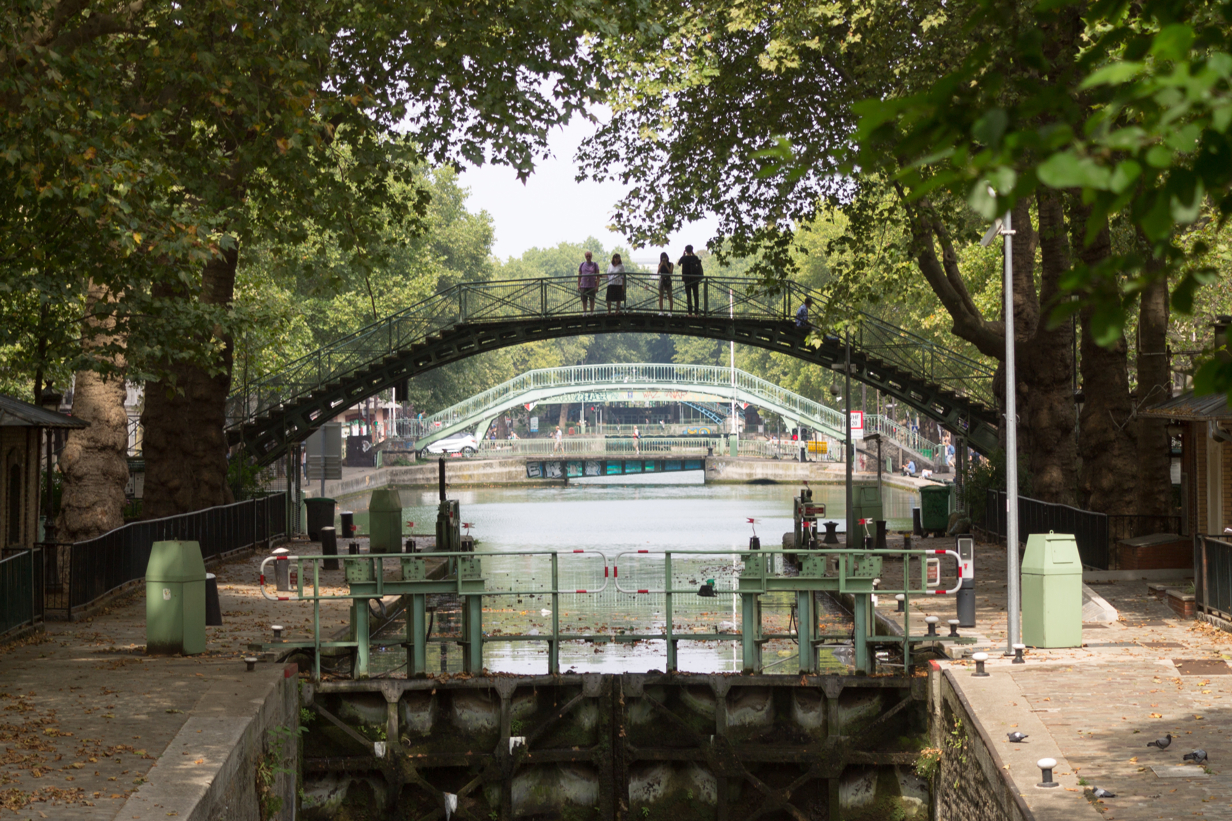 Passerelle des Douanes, Canal Saint Martin, Paris.